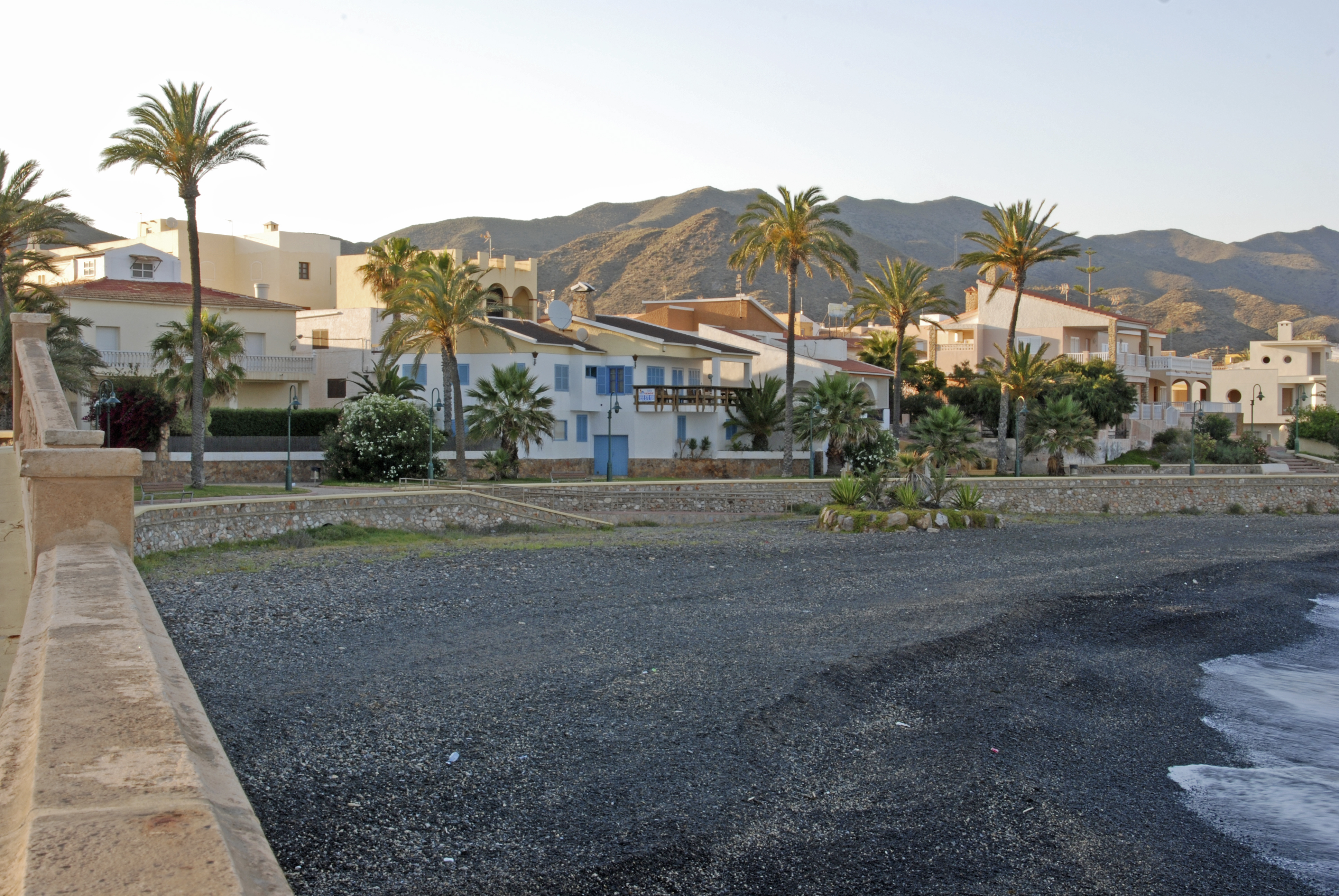 Padenía de Cuevas del Almanzora